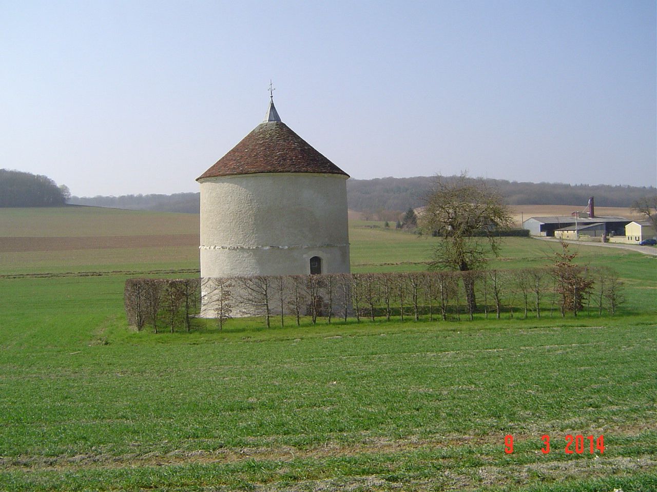 Bucey-en-Othe - Colombier du Chaast